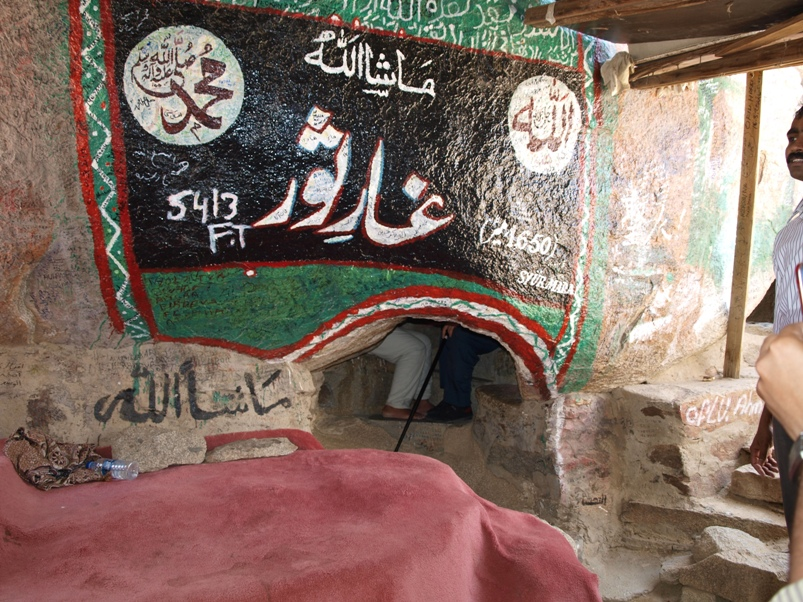 സൗർ ഗുഹാ കവാടം